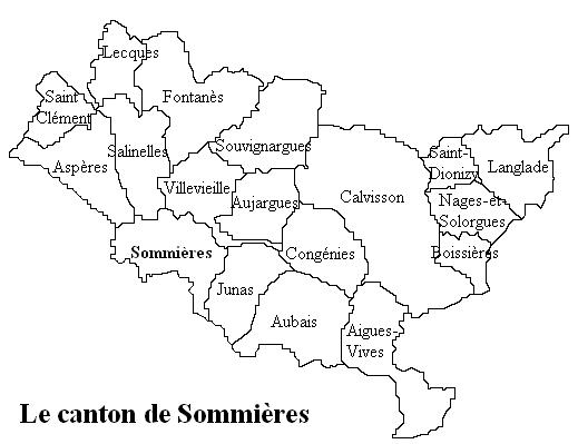 Le canton de Sommières Image personnelle